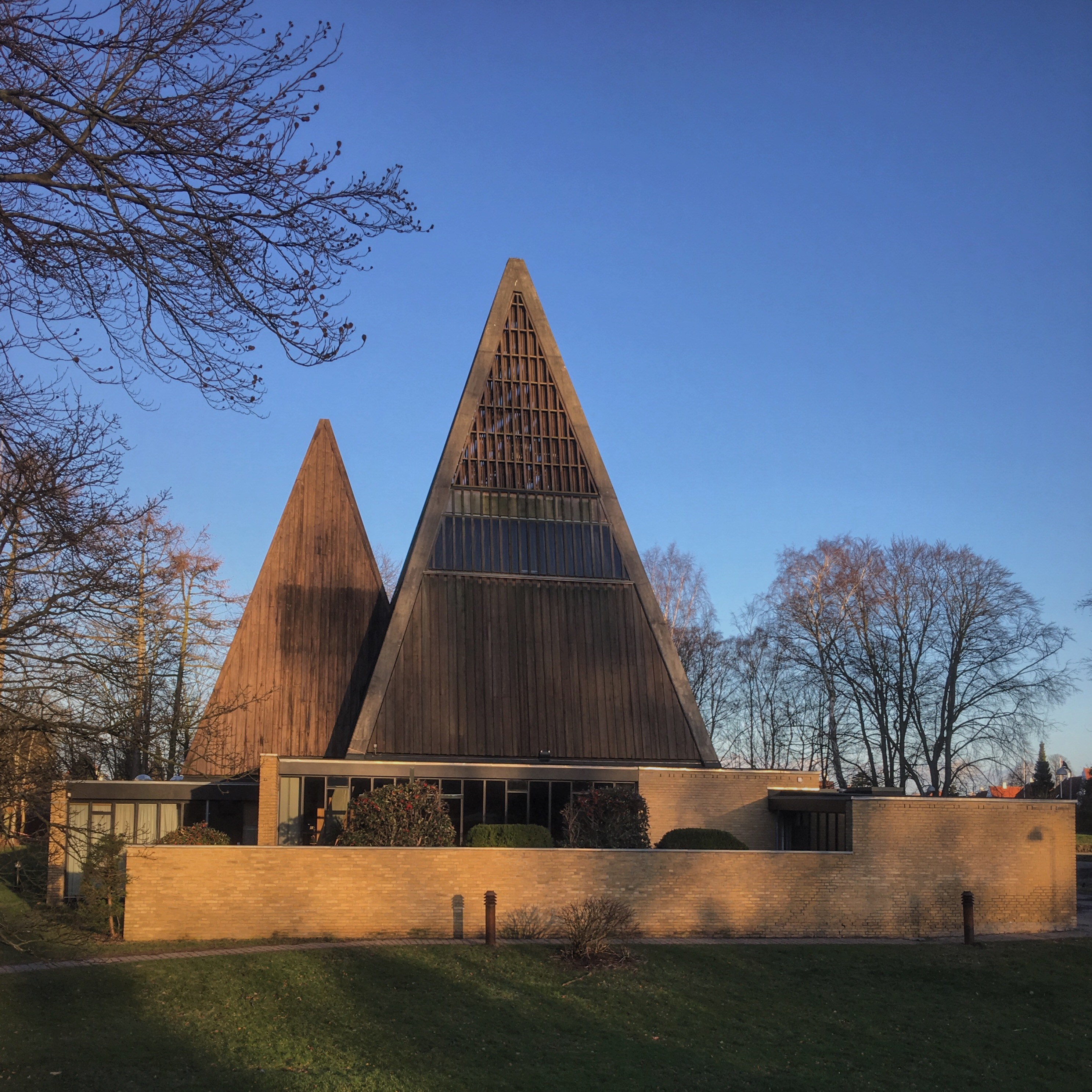 Vestervang Church in Helsingør, Denmark